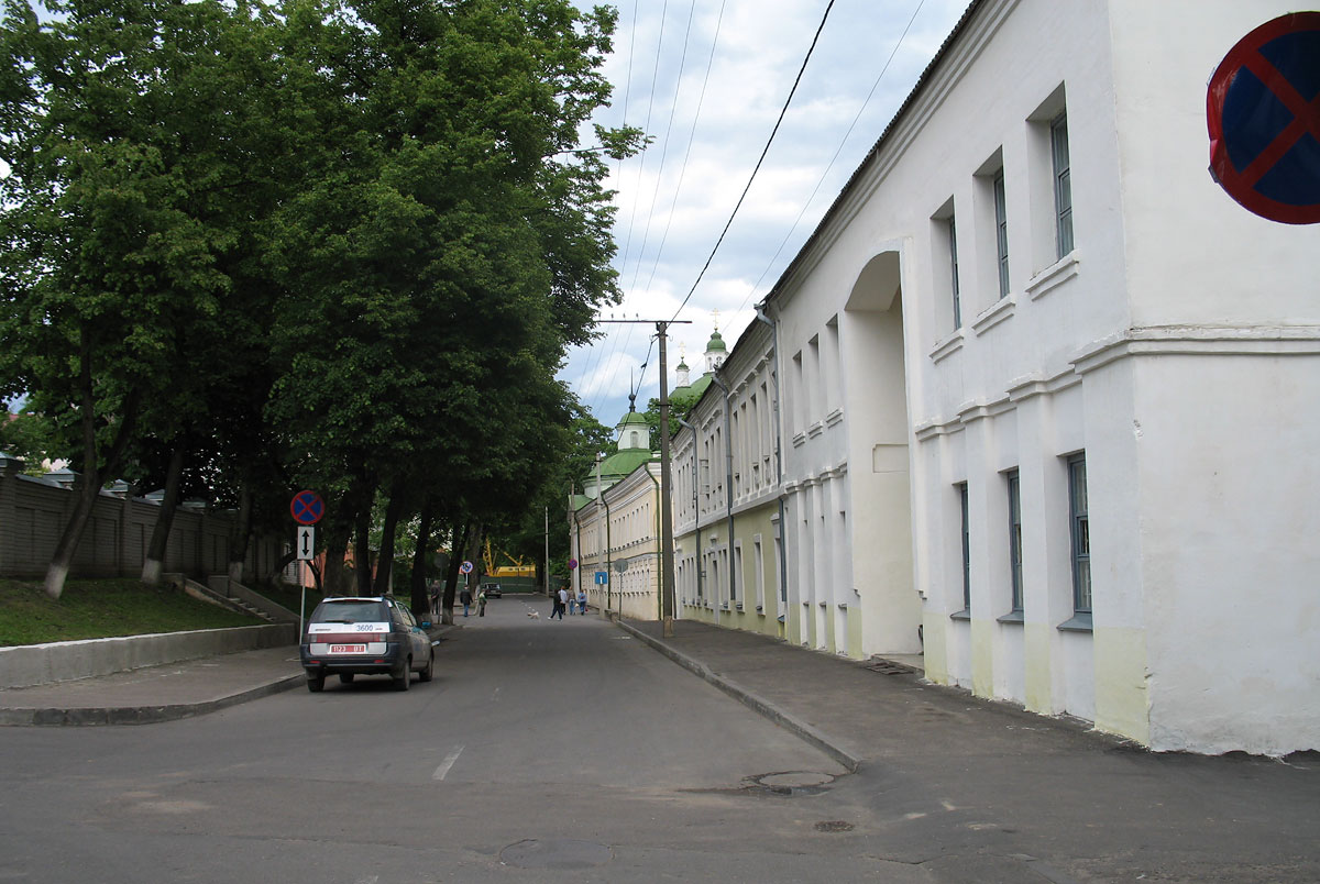 Беларуская (тарашкевіца): Полацак